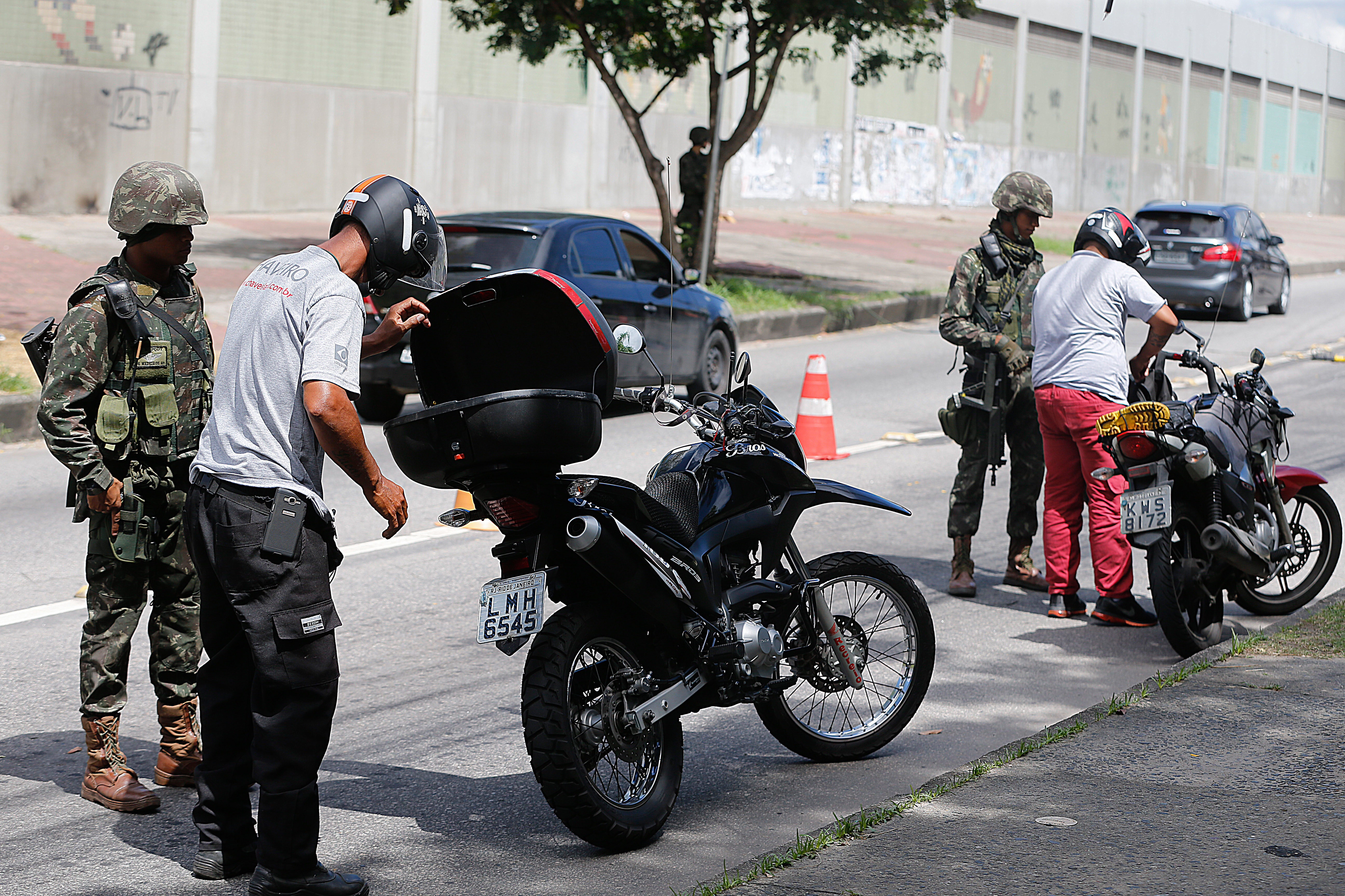 Rio de Janeiro - Militares das Forças Armadas voltaram hoje (1º) às vias expressas e rodovias do Rio de Janeiro para mais uma ação de combate à criminalidade (Tânia Rêgo/Agência Brasil)